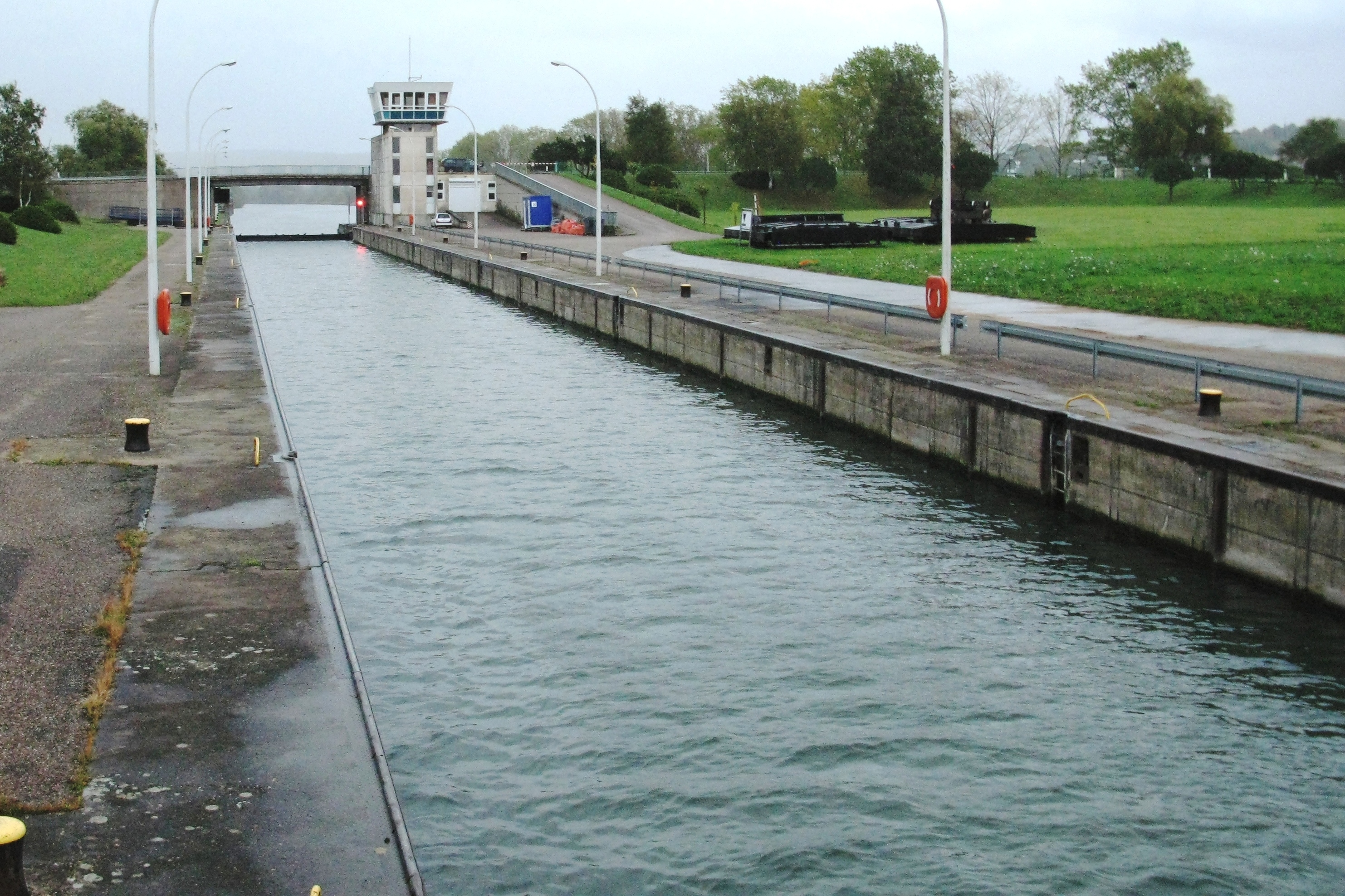 Schleis vu Koenigsmacker, vue op déi ënnescht Paart.